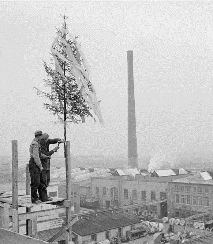 Standard telefon- og kabelfabrikk, menn2, grantre, kranselag.